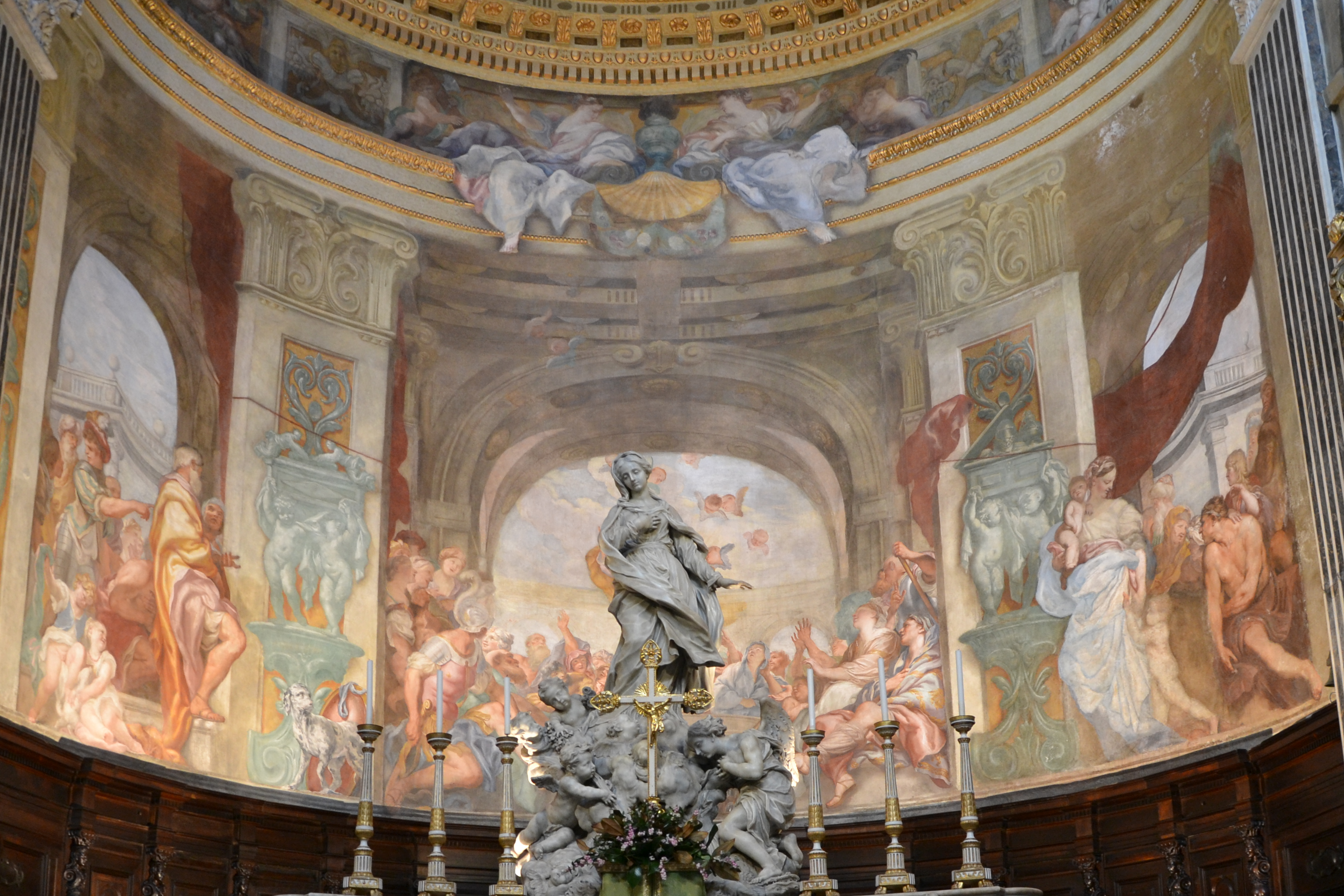 Genova, san luca, immacolata di filippo parodi, affreschi di domenico piola, 1695, e quadrature di anton maria haffner